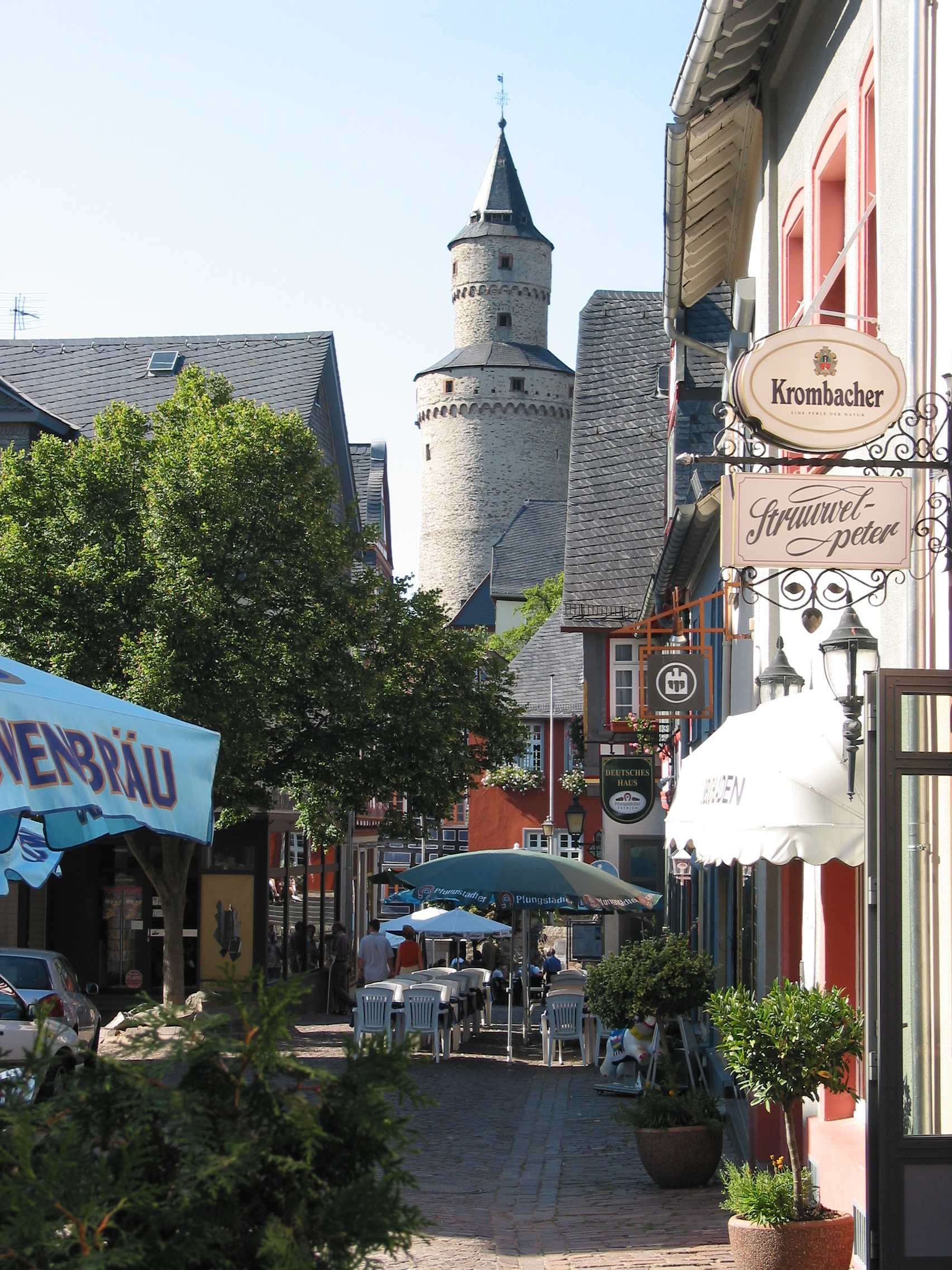 Description: Hexenturm in Idstein Source: Selbst fotografiert, August 2003 Photographer/Painter: Ralf Ziegler, --RalfZi 16:38, 22 Mar 2005 (UTC)